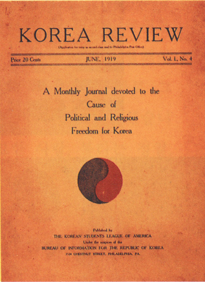 워싱턴 구미위원부 예하 필라델피아 한국통신부에서 서재필 등이 발간한 『KOREA REVIEW』